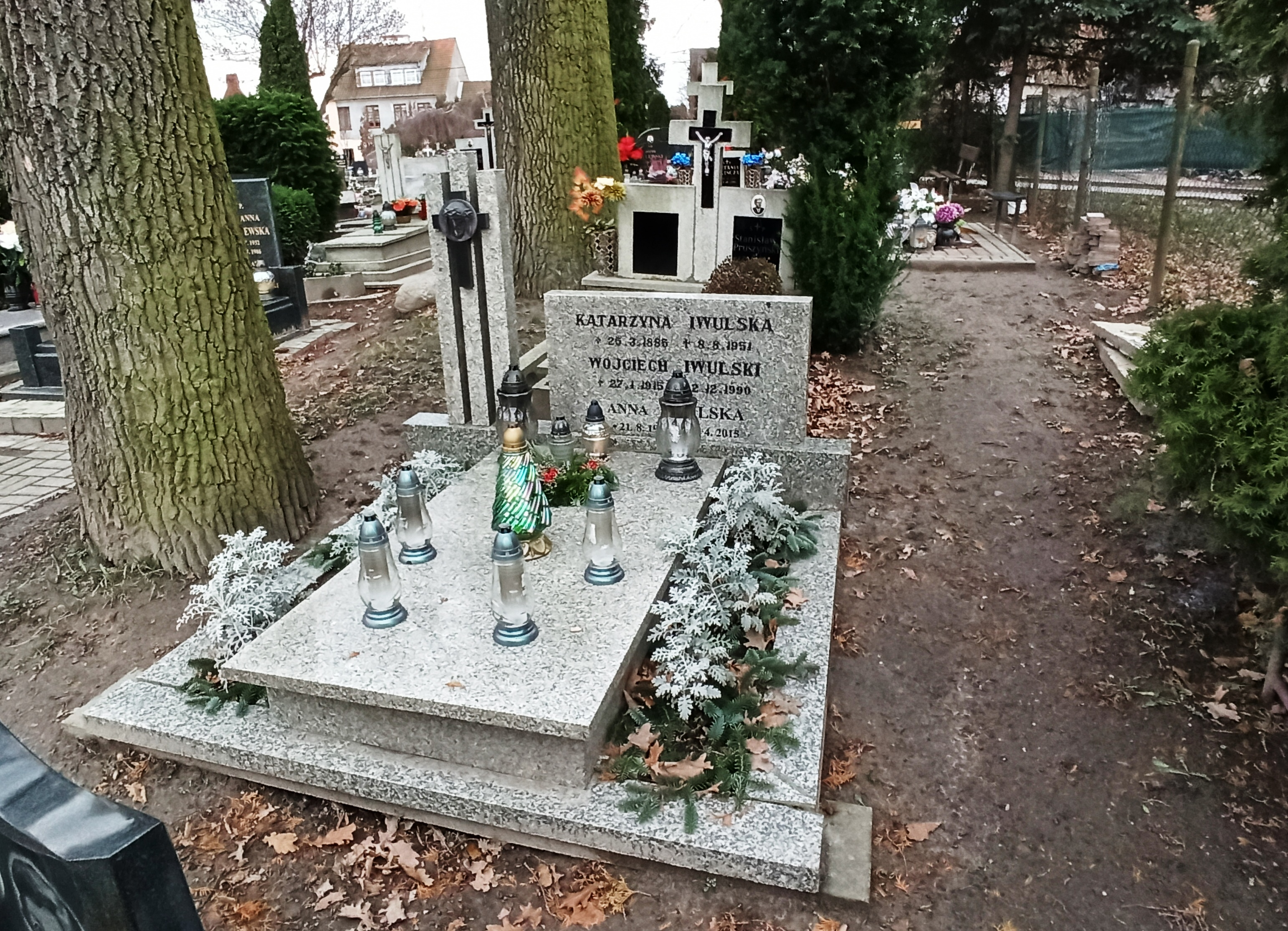 Wojciech Iwulski grób cmentarz ul. Morska w Braniewie 2019